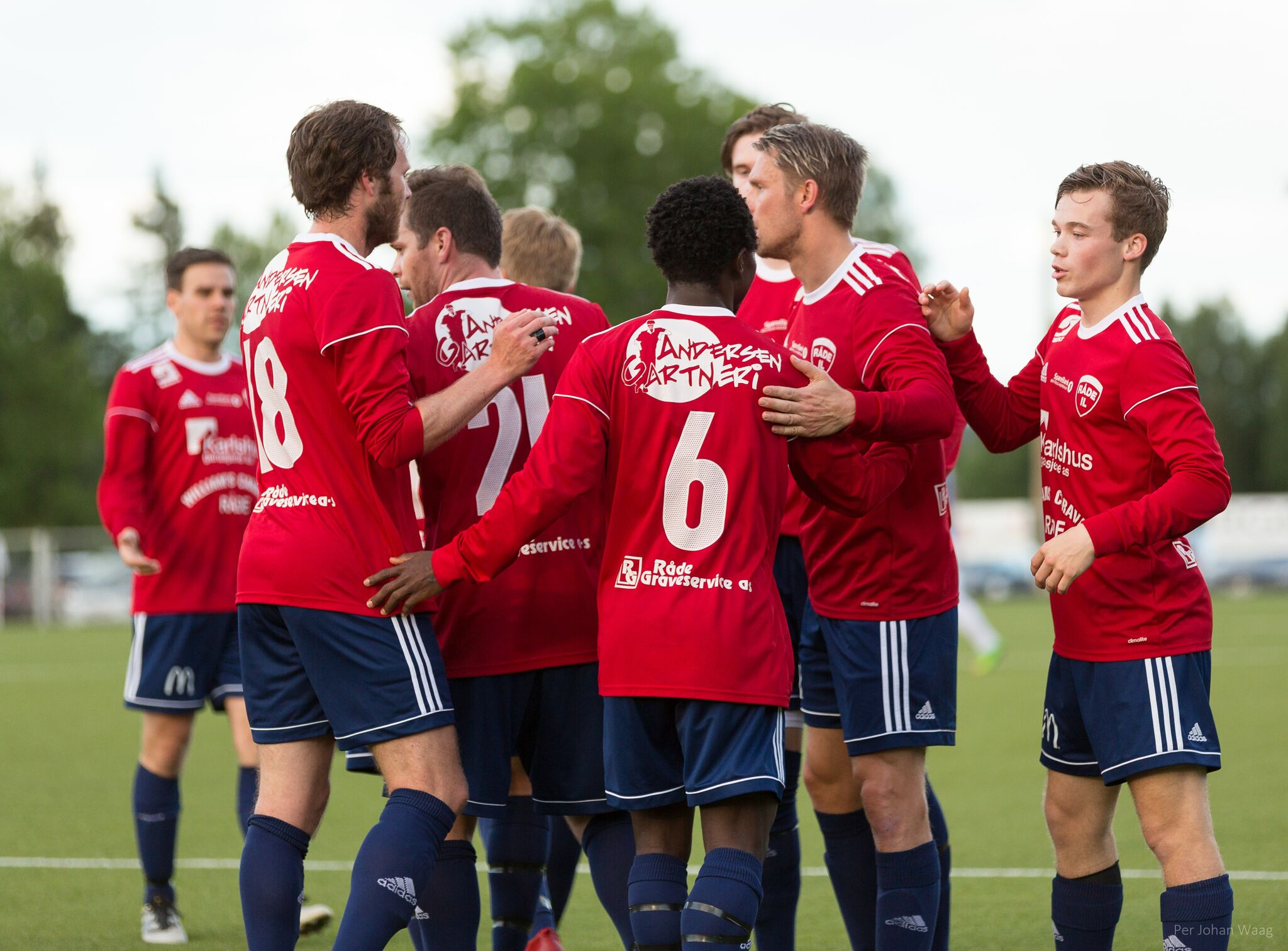 Råde2017